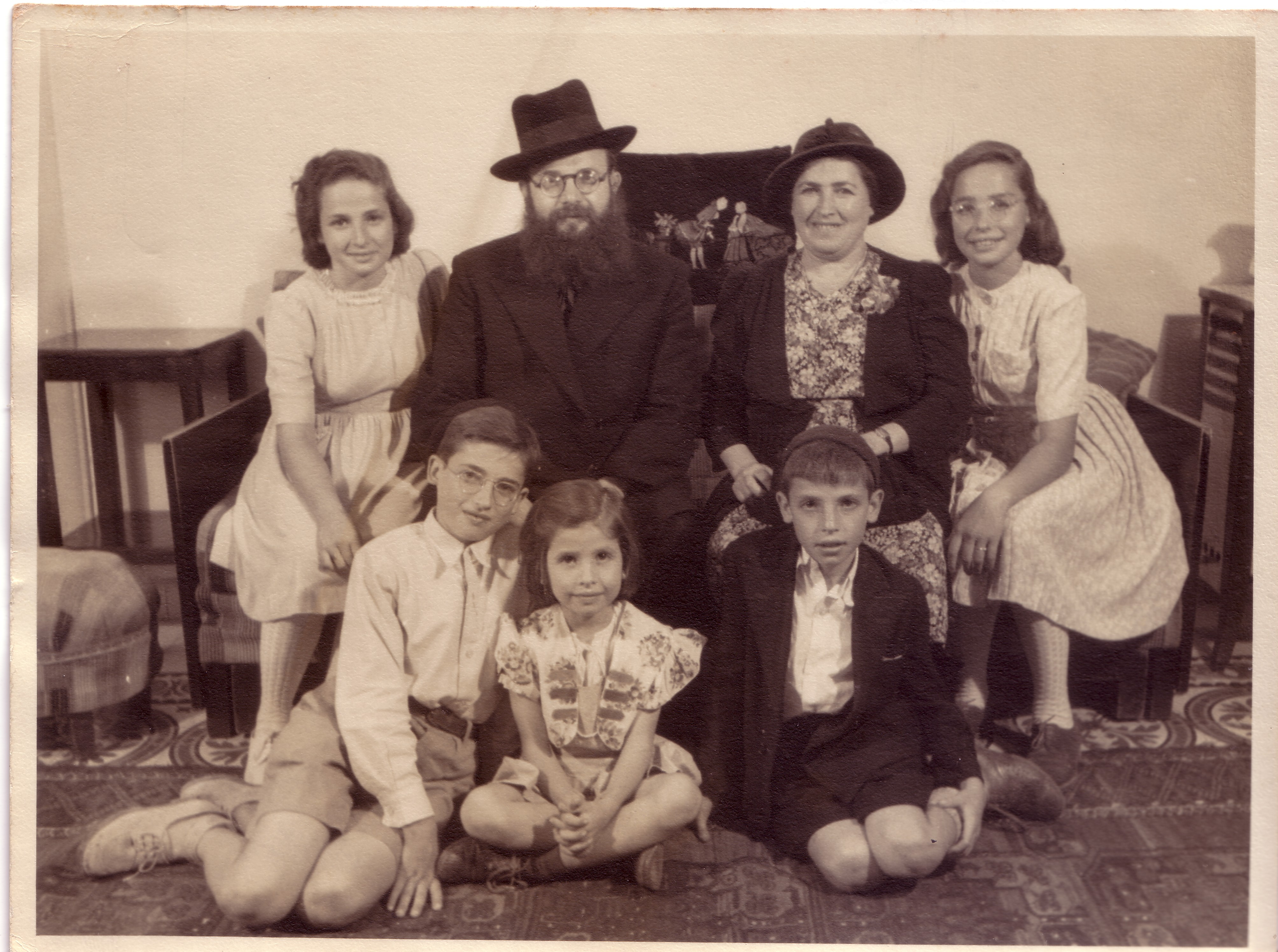 משפחת אליעזרי, ירושלים 1945